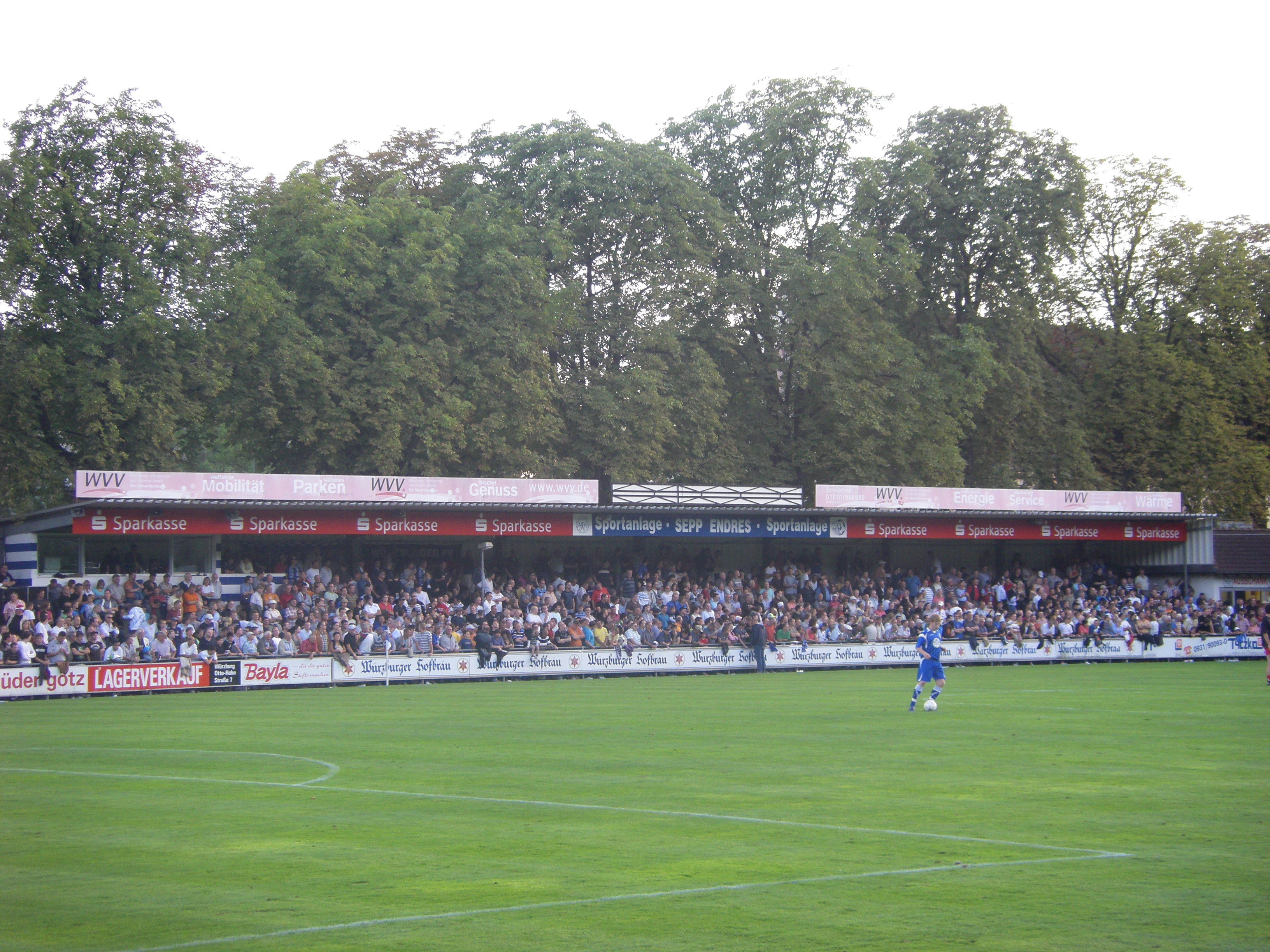 Stehplatztribüne des Stadions des WFV